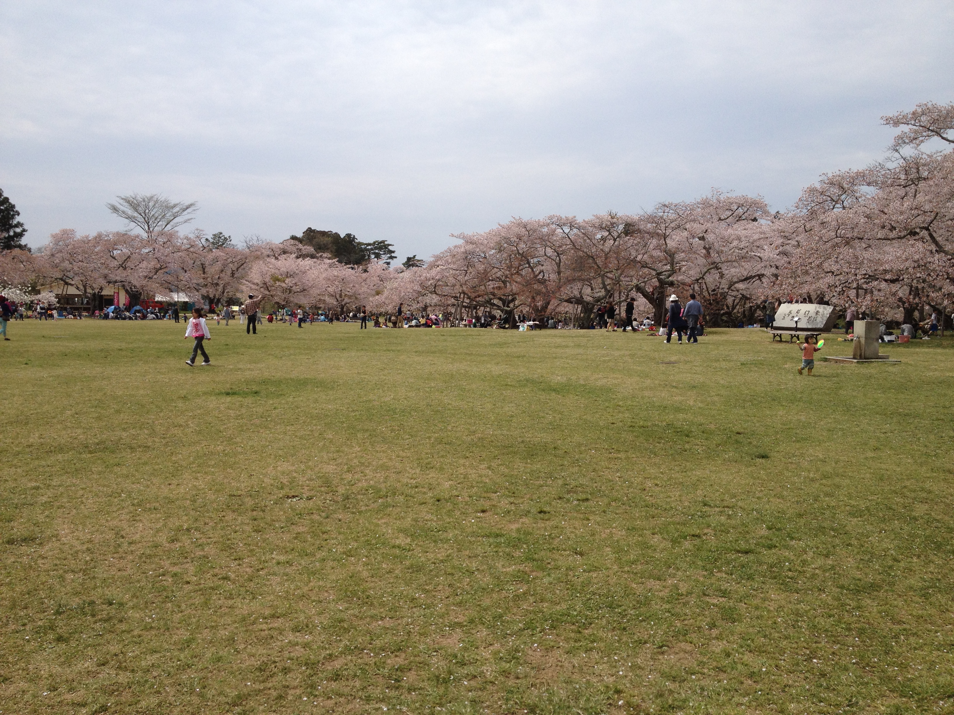 三神峯公園・芝生広場（2015年4月）